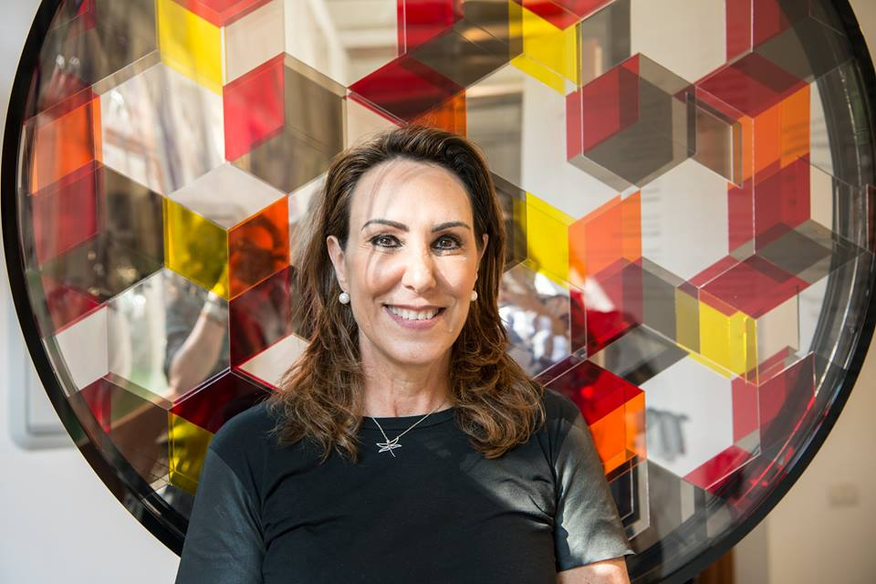 “La obra de Irene Zundel se ha caracterizado por manejar la abstracción, campo en el que siente no tener limitaciones. Tan sólo deja su mente volar y materializar sus sueños, fantasías y su manera muy particular de concebir el mundo”.